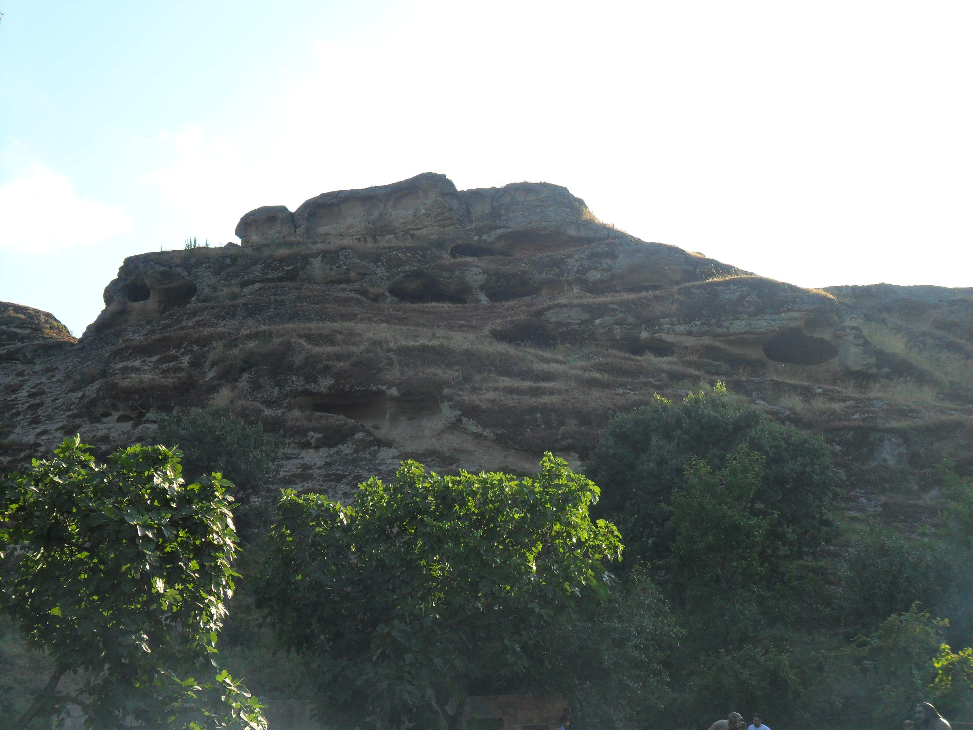 Tekkeköy Mağaraları Arkeoloji Vadisi'nde yer alan mağaraların bir kısmının uzaktan görünümü.